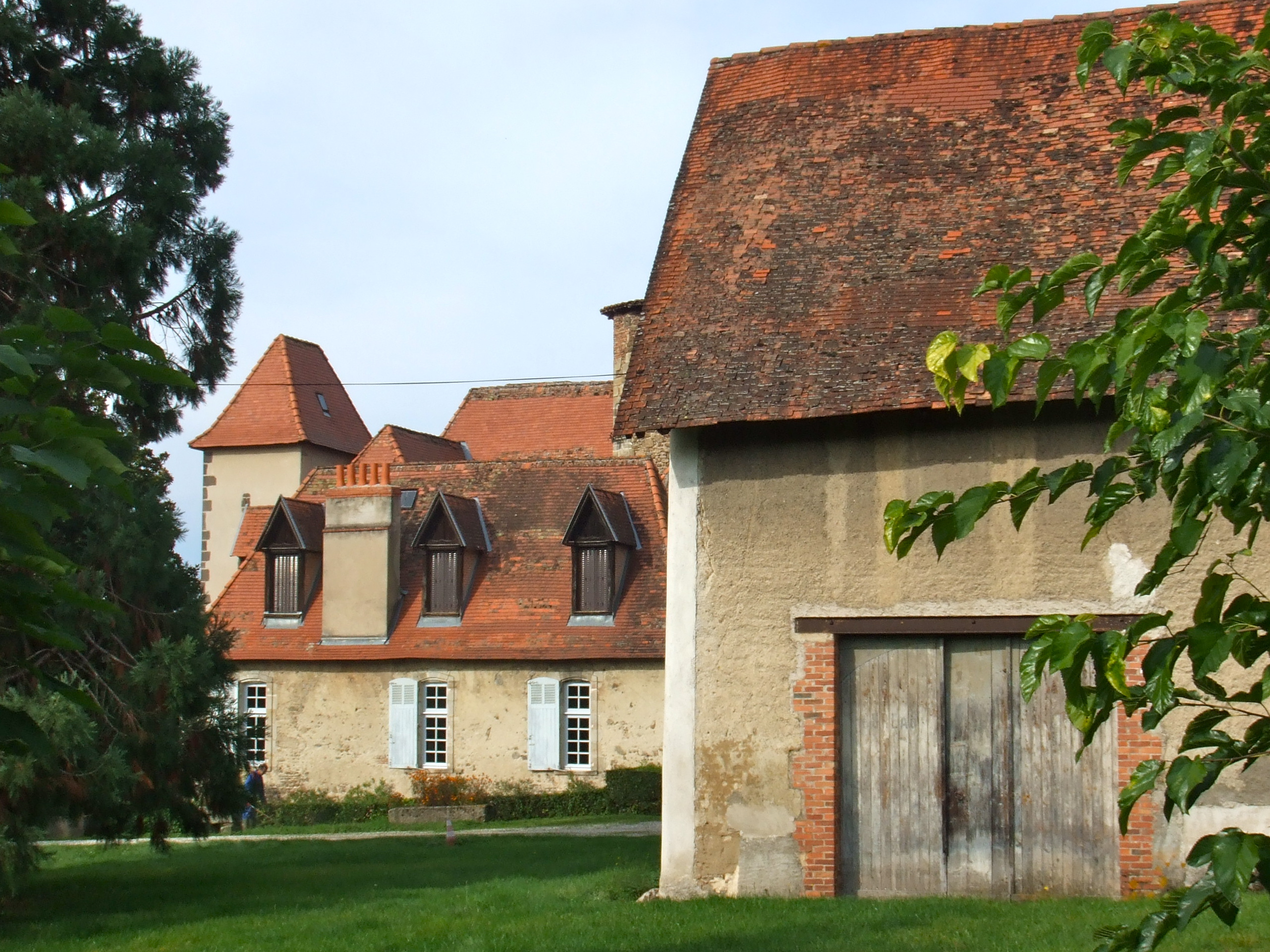 Château de Franc-Séjour, Thiers, 63 .